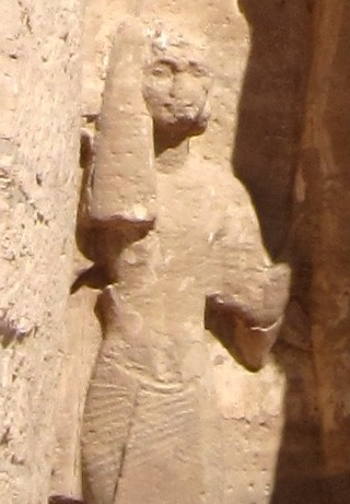 Linke der drei linksseitigen Skulpturen des kleinen Tempels von Abu Simbel (Hathor-Tempel oder Tempel der Nefertari), Ägypten Prince Meryatum.